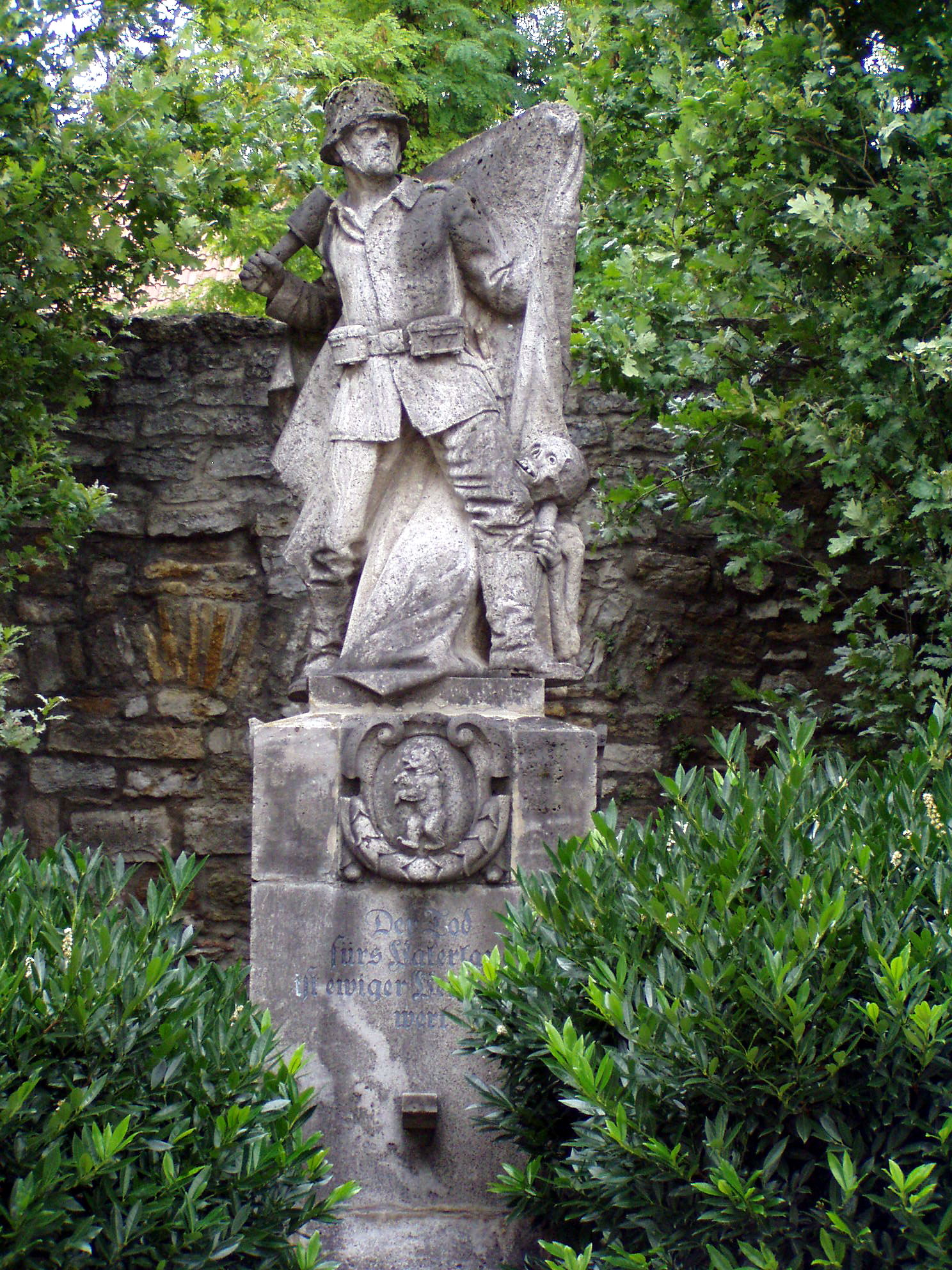 Das Kriegsdenkmal von Richard Rother in Mainbernheim / Unterfranken